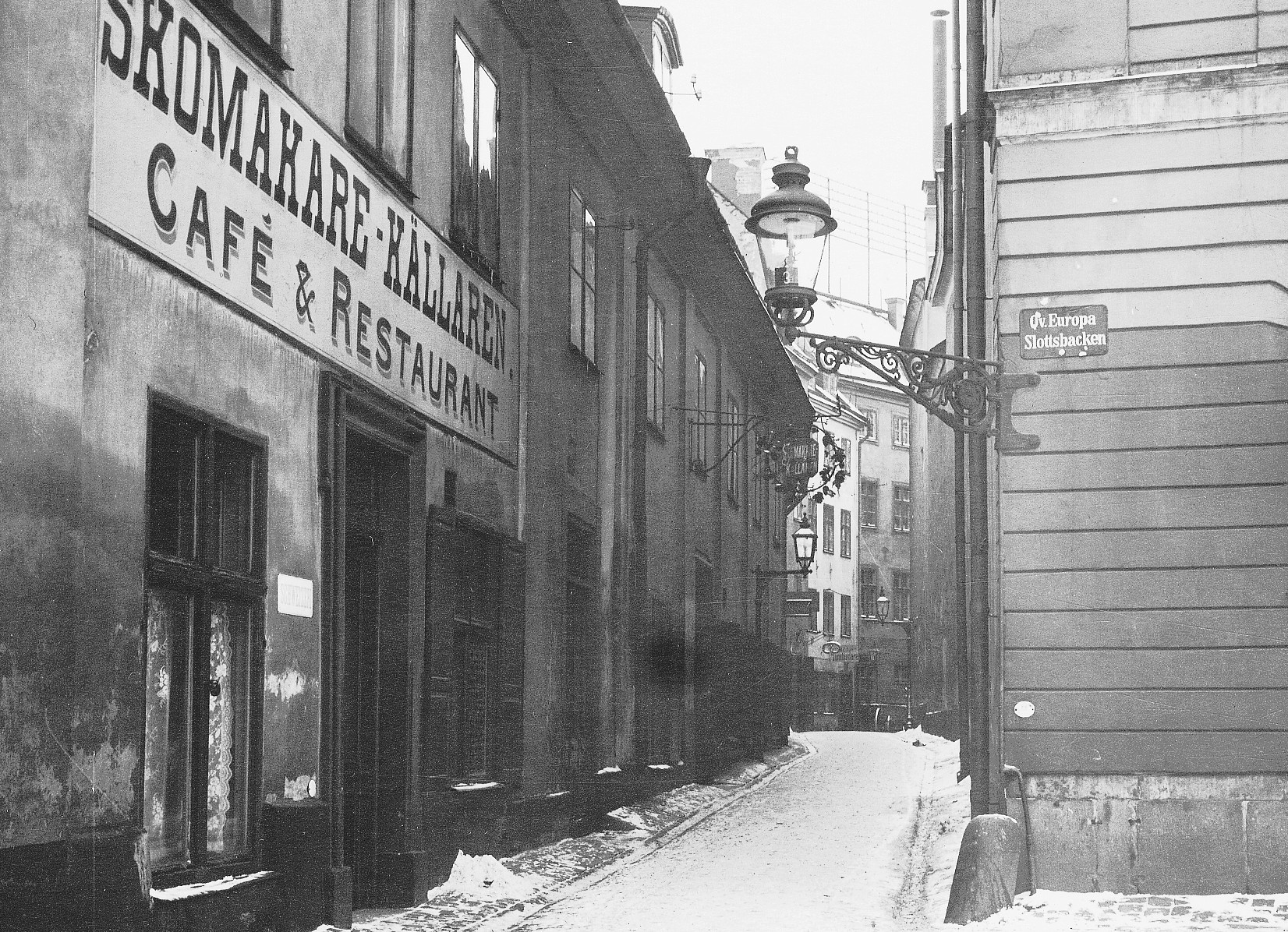 Skomakarekällaren, ingång från Bollhusgränd